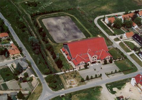 Szabadszállás, Hungary, aerialphotography